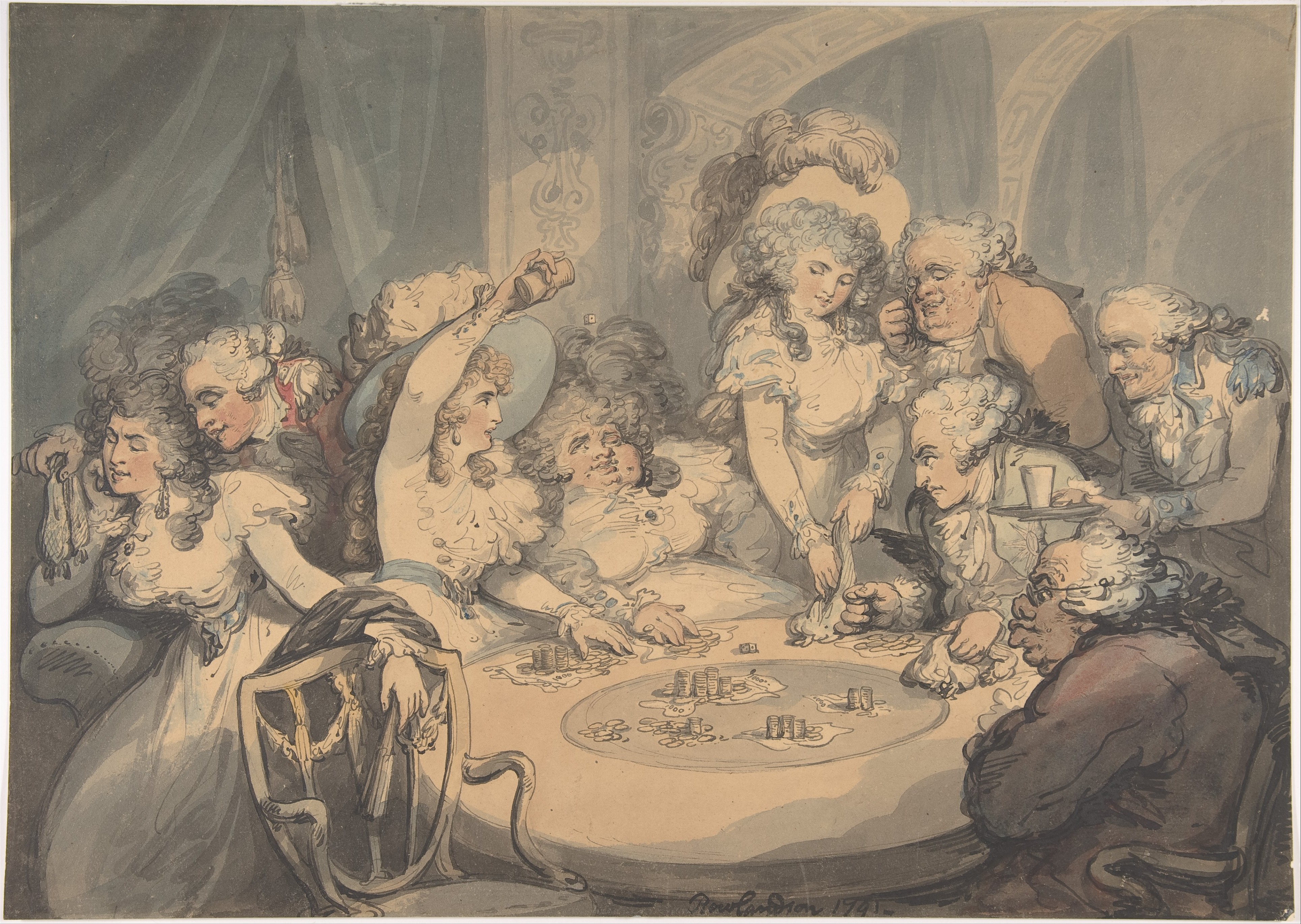 Drawing; Drawings